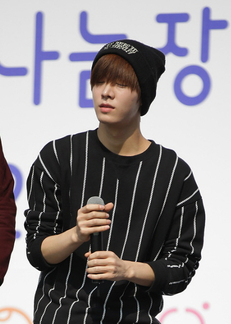 비정상회담 위아자나눔장터